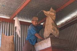 Salvadoran coffee farmer